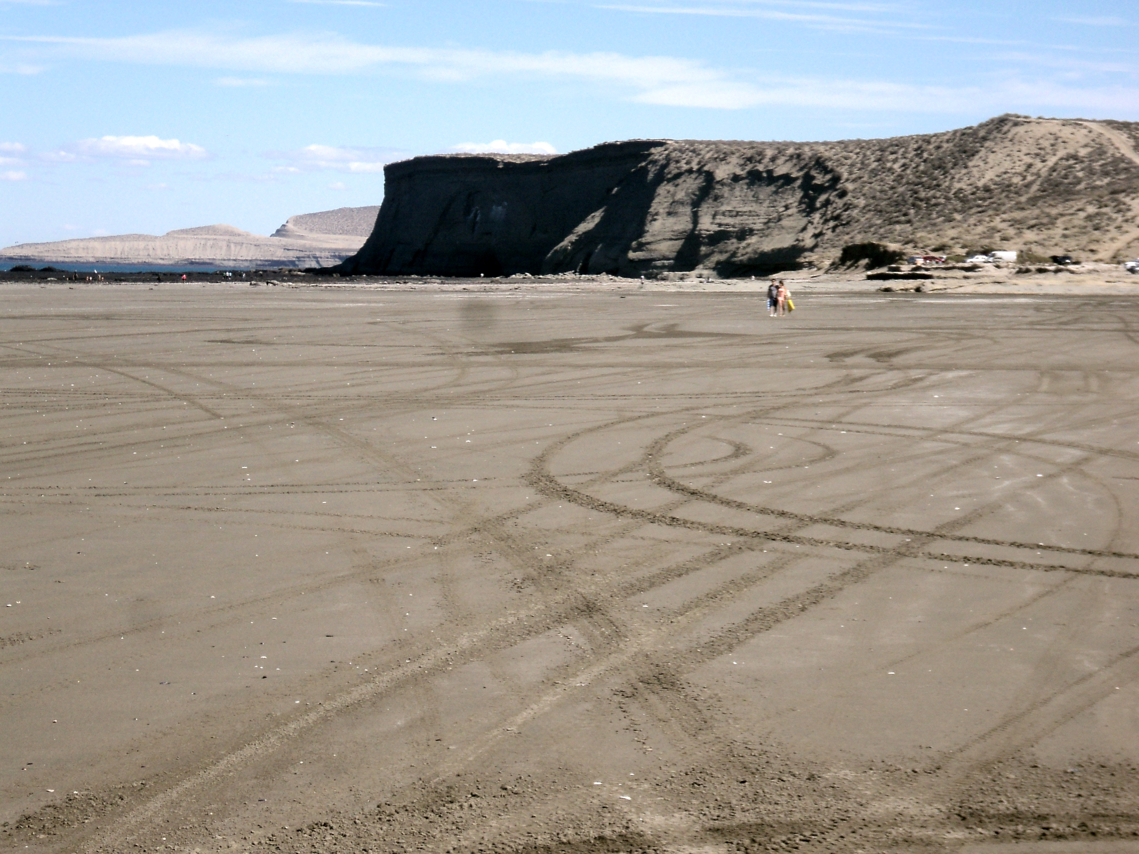 Playa Bonita desde punta Maques